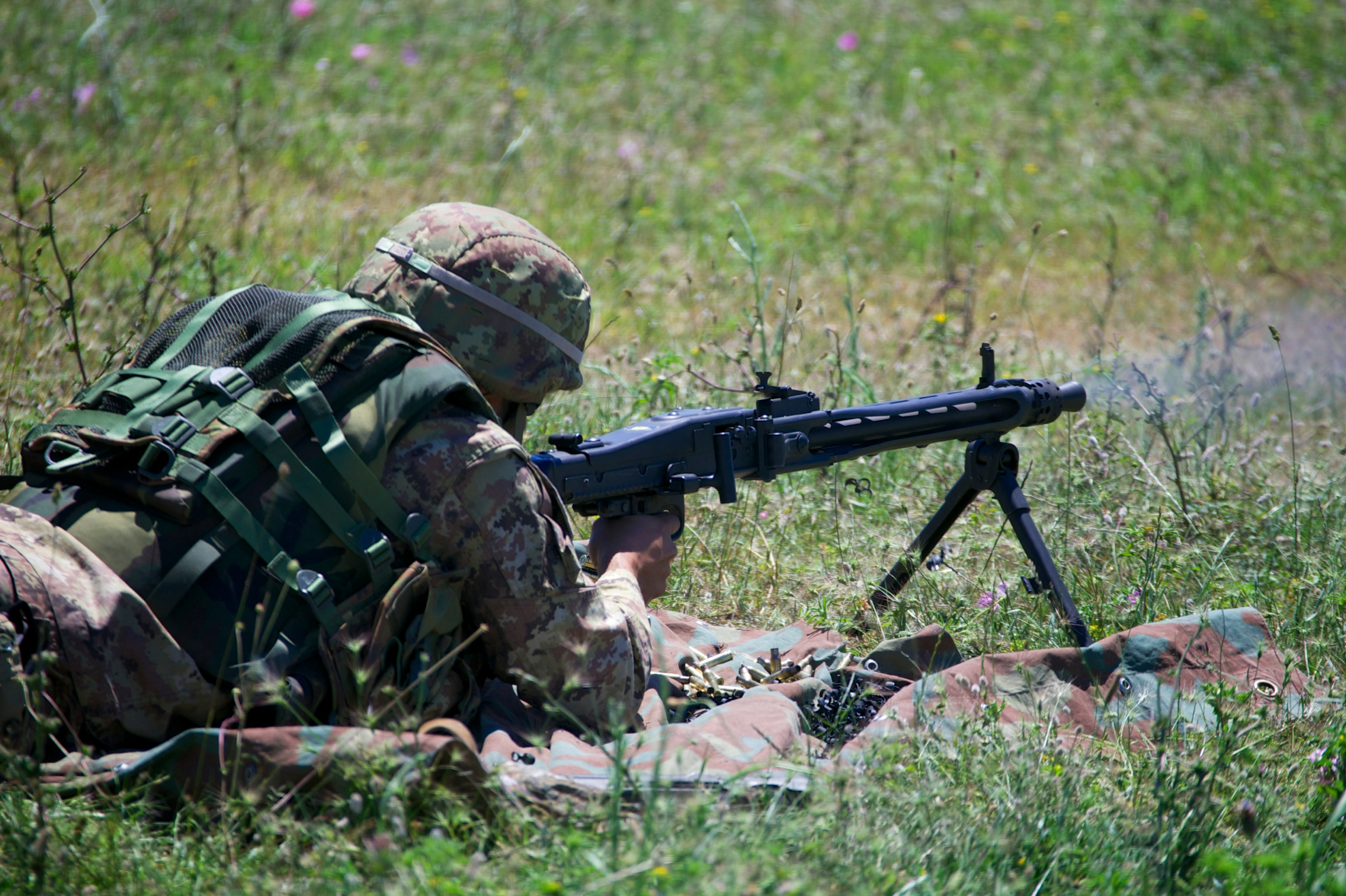 Campo d'Arma del Comando Brigata Granatieri di Sardegna Monte Romano, Giugno 2013